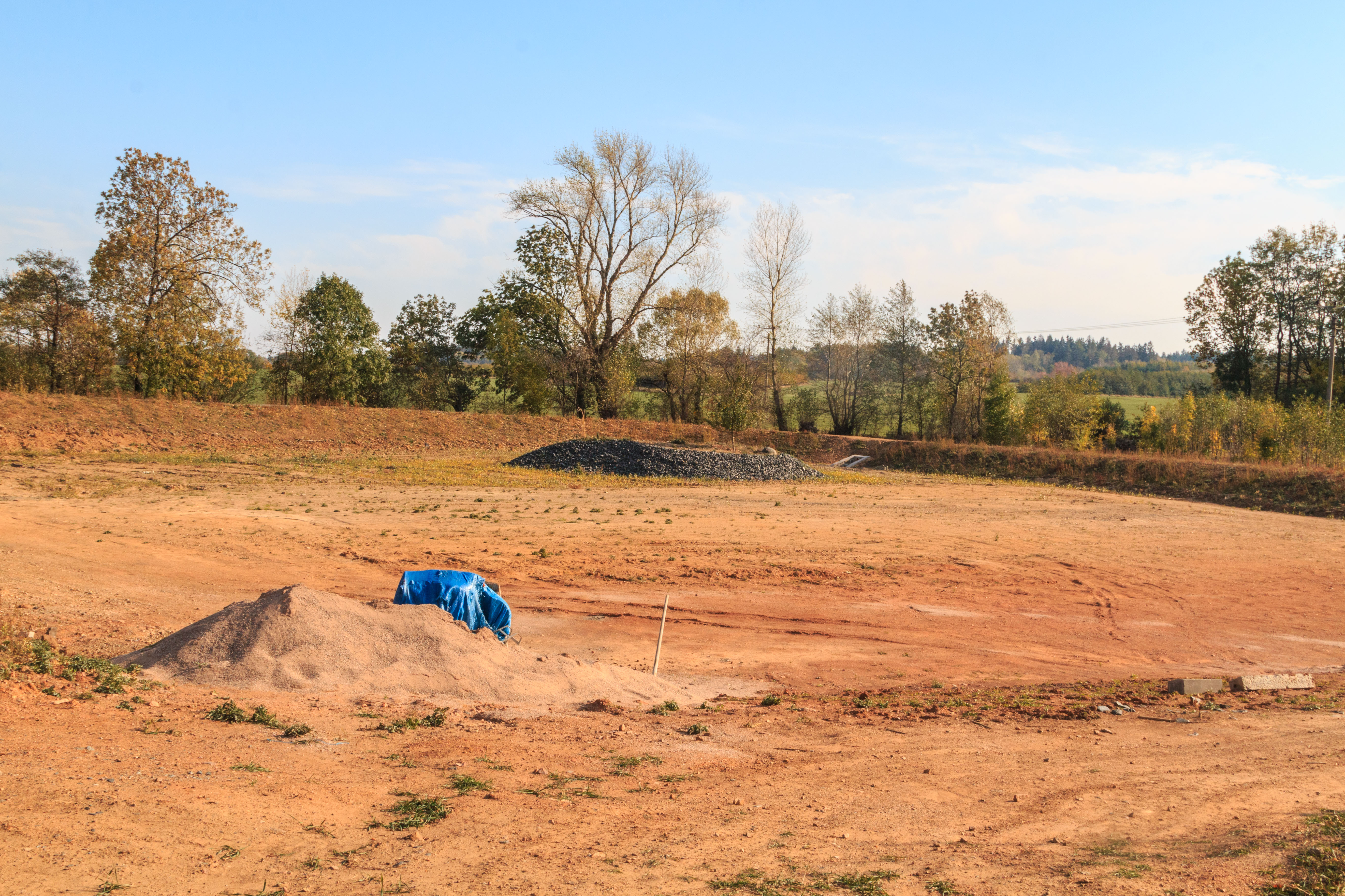 Nový rybník pod Krupínem Project: Vodstvo. Ticket: 1617.